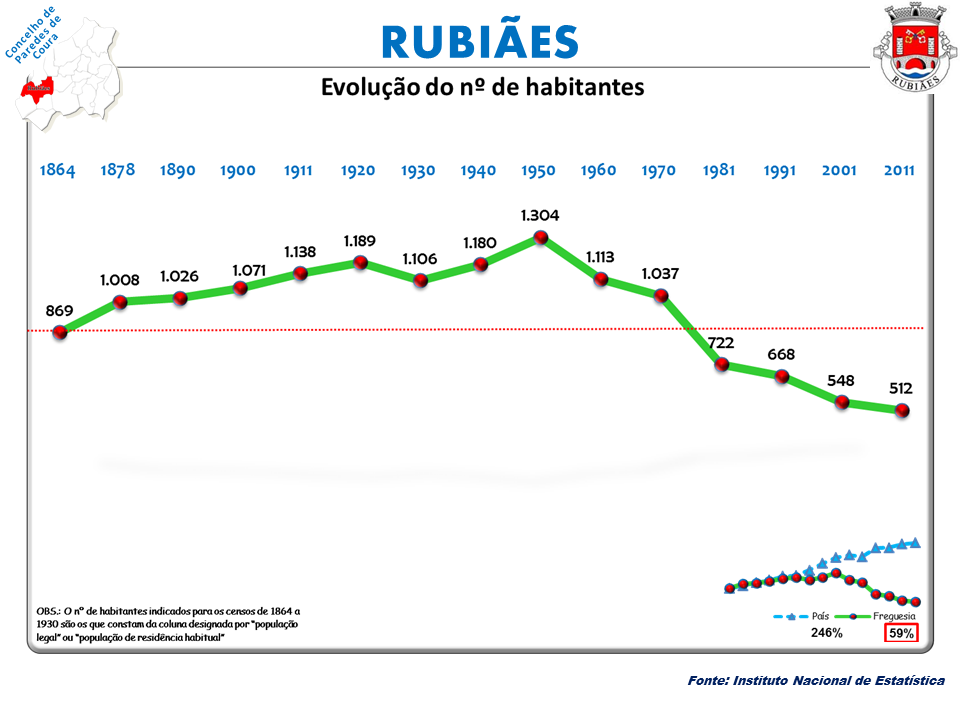 Censos 1864/2011